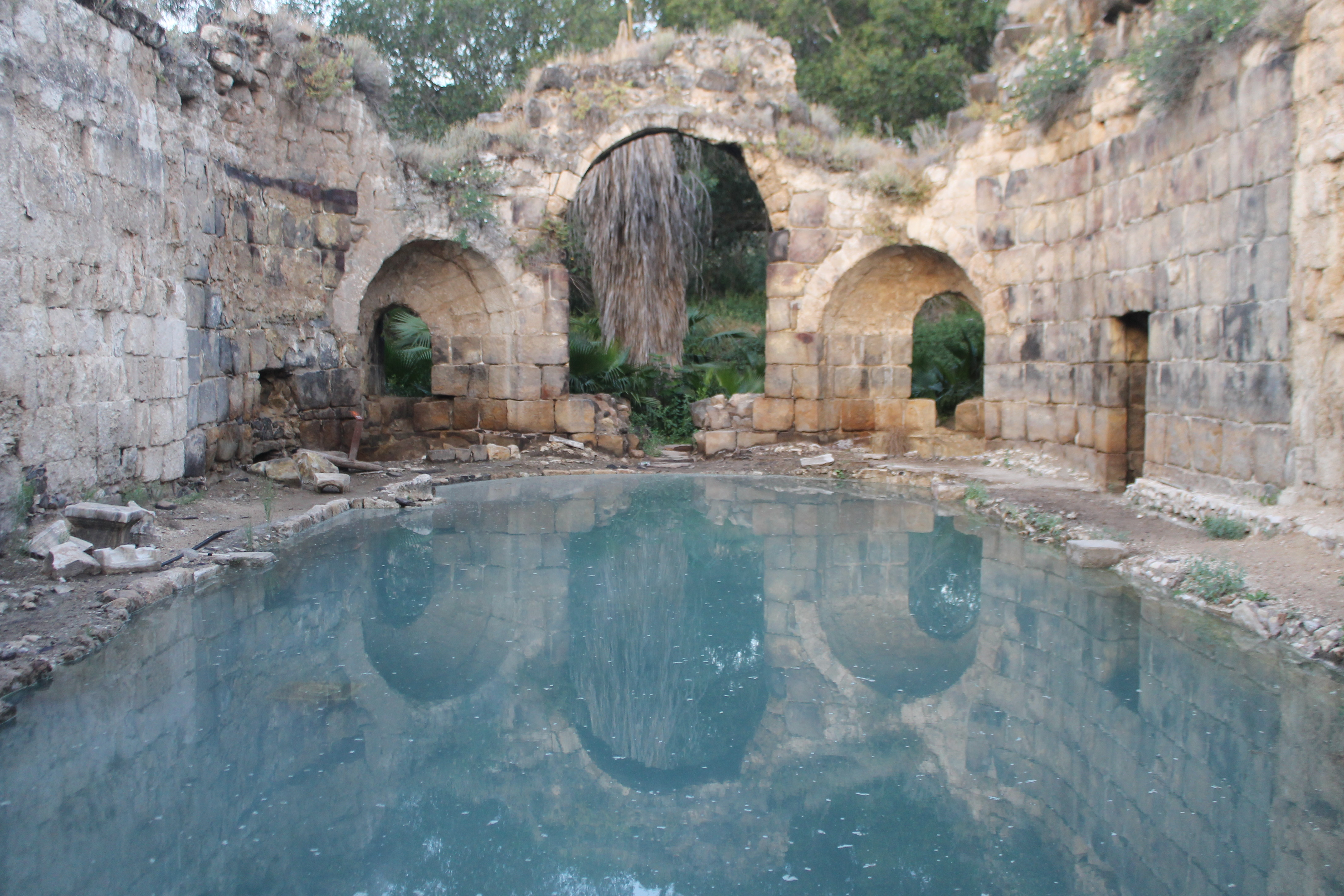 בתקופה הרומית בארץ ישראל החלה בניית המרחצאות הרומאיים. המעיינות החמים שימשו כאתר מרפא בשל האמונה בכוחם המרפא של המים. במקום נבנה אתר גדול הכולל מבני מרחצאות מפוארים המקושטים בפסלים, בקירות שיש ובמזרקות. מאחר שהמבקרים במקום שהו בו משך מספר ימים, נבנו בו בתי הארחה, מבני תיאטרון ואף מבני דת, כמו מקדשי אלילים ובית כנסת. במקום נמצאו שרידי התיאטרון הרומי שנבנה במאה השלישית ובו 2,000 מקומות ישיבה.